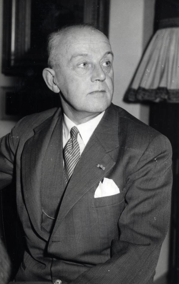 Portret van de heer H.A.M.T. Kolfschoten, burgemeester van Eindhoven. Nederland, 4 januari 1957.